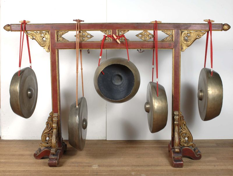 Slaginstrument. Het houtsnijwerk (ukiram) van de onderstellen is gemaakt in de beroemde Djajadipuram volgens aanwijzingen van het toenmalige hoofd. De versieringsmotieven vertonen een melange van 19e eeuwse Biedermeyermotieven (de plantenbak op de gender, de barung en de gambang, het bladermotief) en authentieke Javaanse ornamenten. De gamelan is afkomstig uit de kapatihan van Jogjakarta, waar deze in de tweede helft van de negentiende eeuw werd vervaardigd in opdracht van de regerende patih (eerste minister van het sultanaat Ngajogyaningrat), prins G.P.H. Hadiloesoemo. Deze gamelan werd als losse slendro-gamelan voor het privégebruik van deze patih gebouwd. Er hoort naar alle waarschijnlijkheid geen pelog-helft bij. Er zijn meer gevallen bekend van dergelijke slendro-gamelans uit de Jogja'se kapatihan. De slenthems maakten oorspronkelijk geen deel uit van deze gamelan, evenmin als de onversierde gender barung, die qua klank gewoon een overbodige verdubbeling is van de wél versierde gender barung. . Gong, hangend aan een standaard, onderdeel van gamelan Slendro Unknown language: Kempul